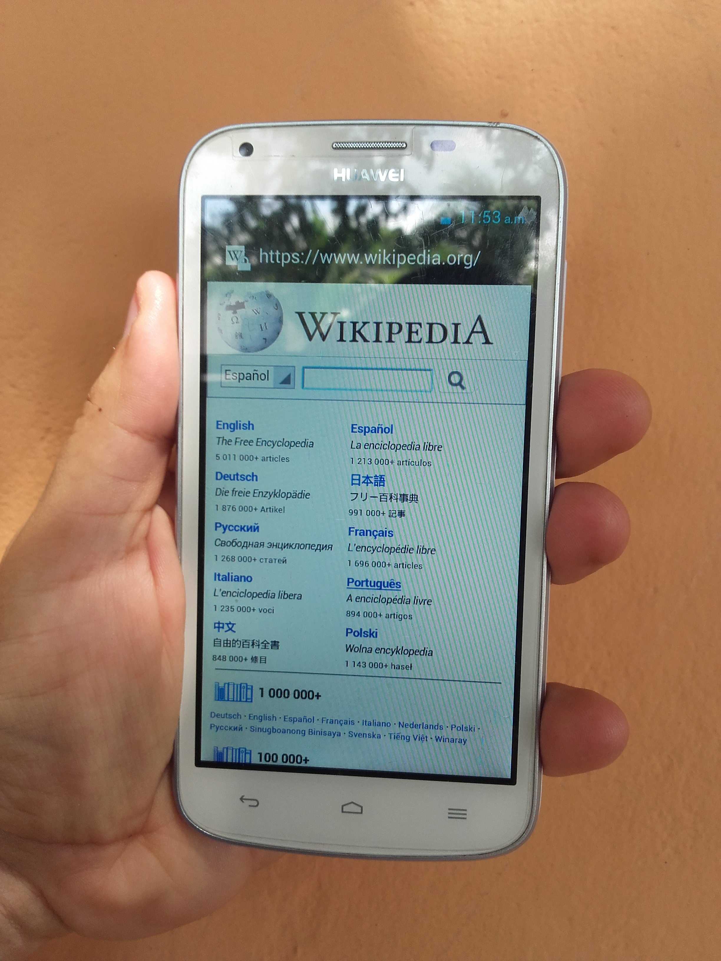 celular